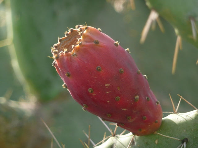 פרי הצבר (סברס)